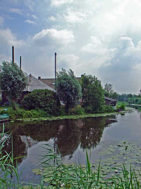 het riviertje de Vlist in Zuid-Holland, Licensing Categorie:Afbeelding Zuid-Holland